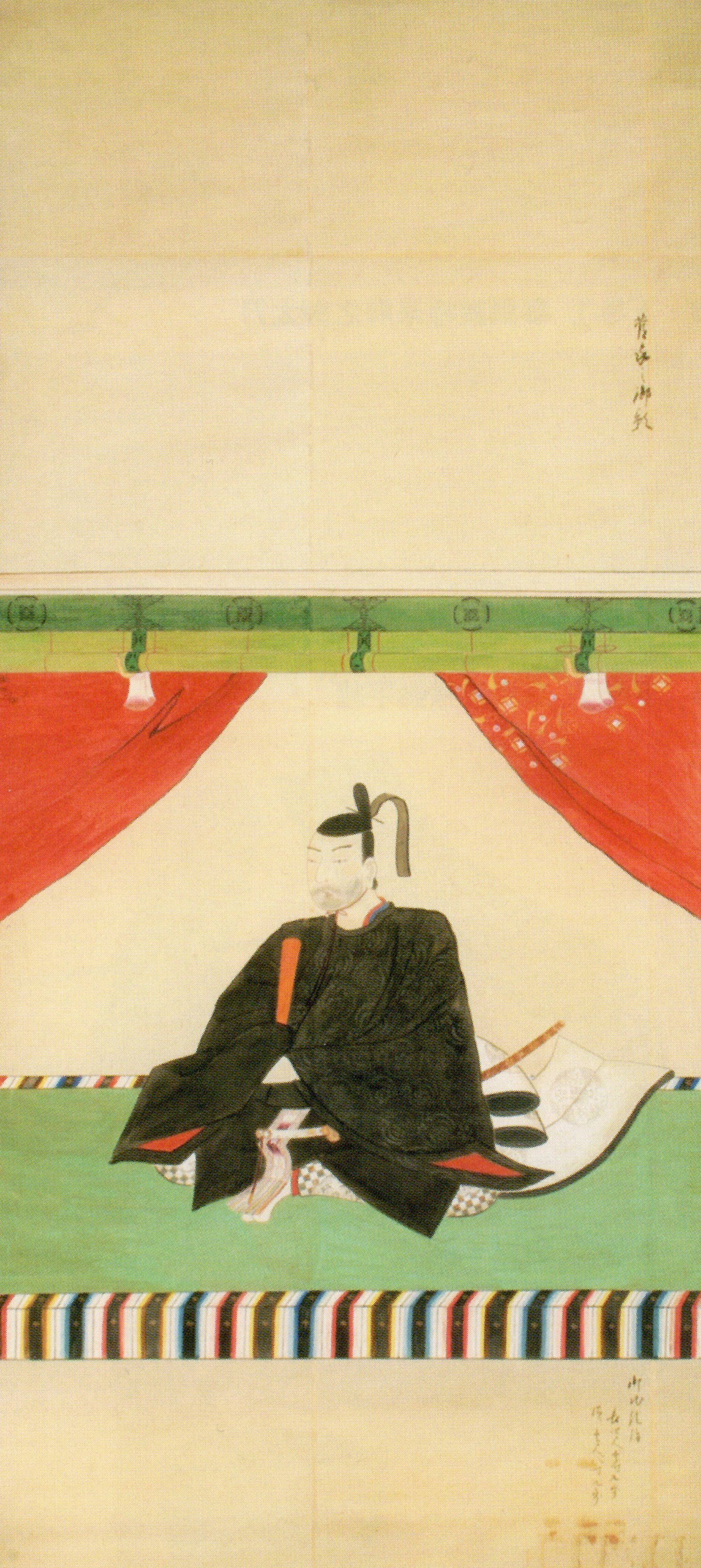 前田重教の肖像。